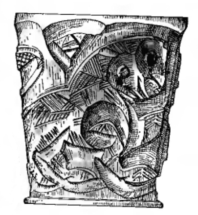 Кубак Святой Ядвігі з Навагрудка